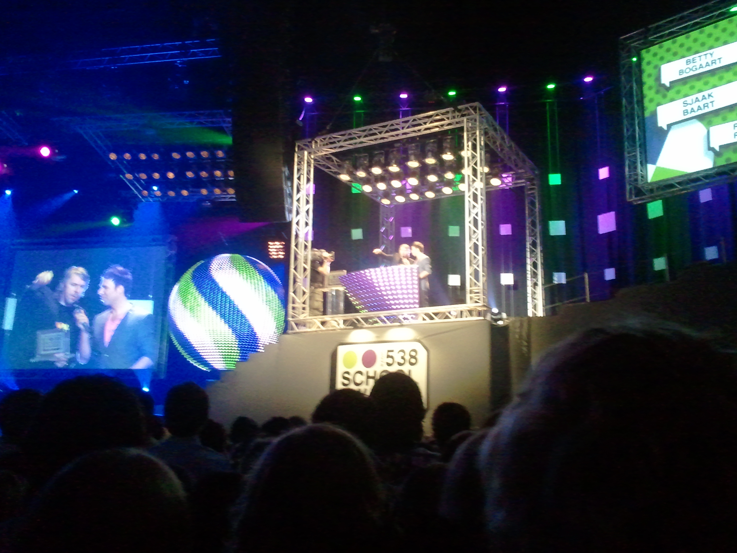 Award uitreiking 538 schoolawards